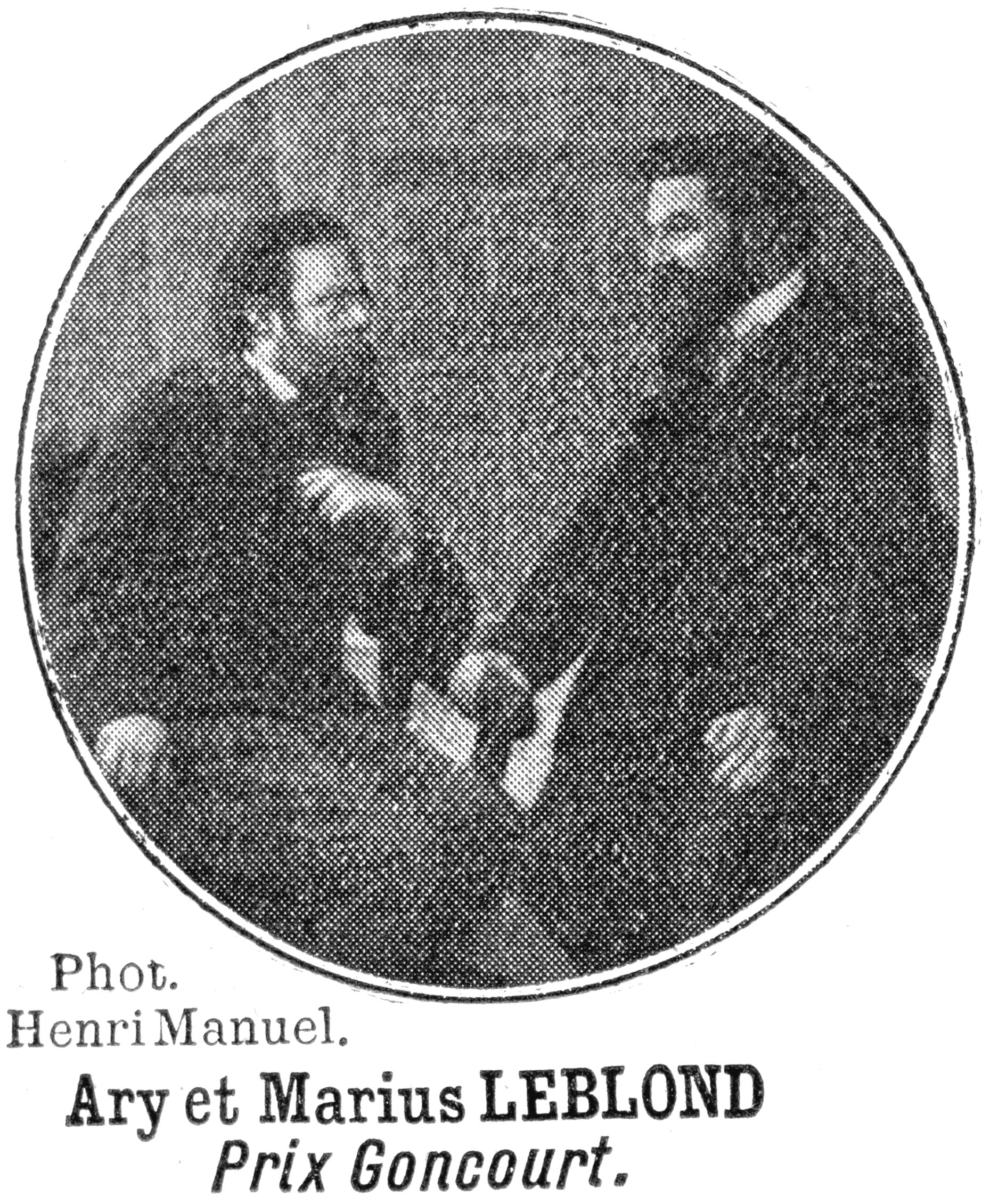 Touche à tout 1910 1er semestre p 83 Ary et Marius Leblond par Henri Manuel